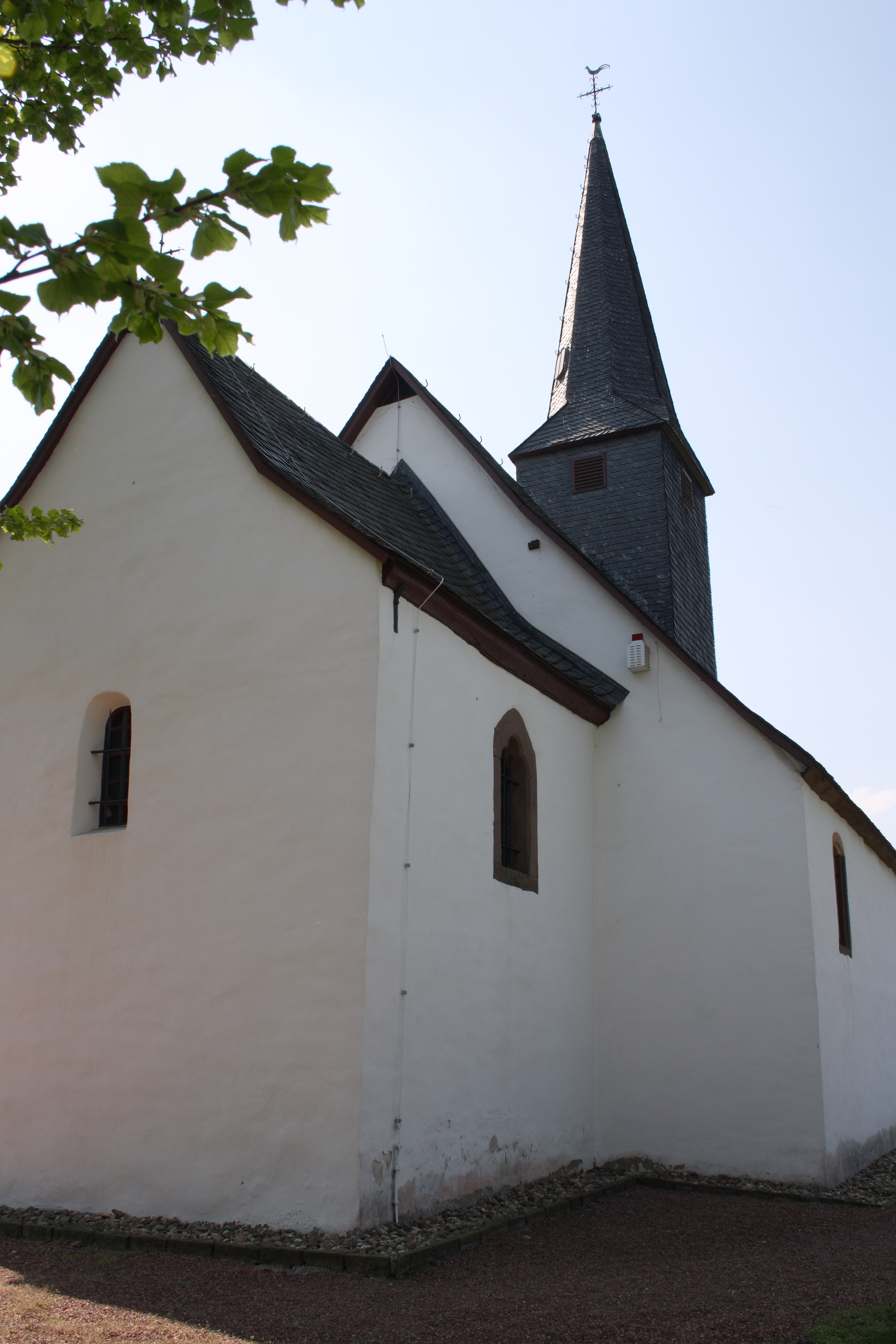 katholische Pfarrkirche St. Laurentius in Niederkastenholz